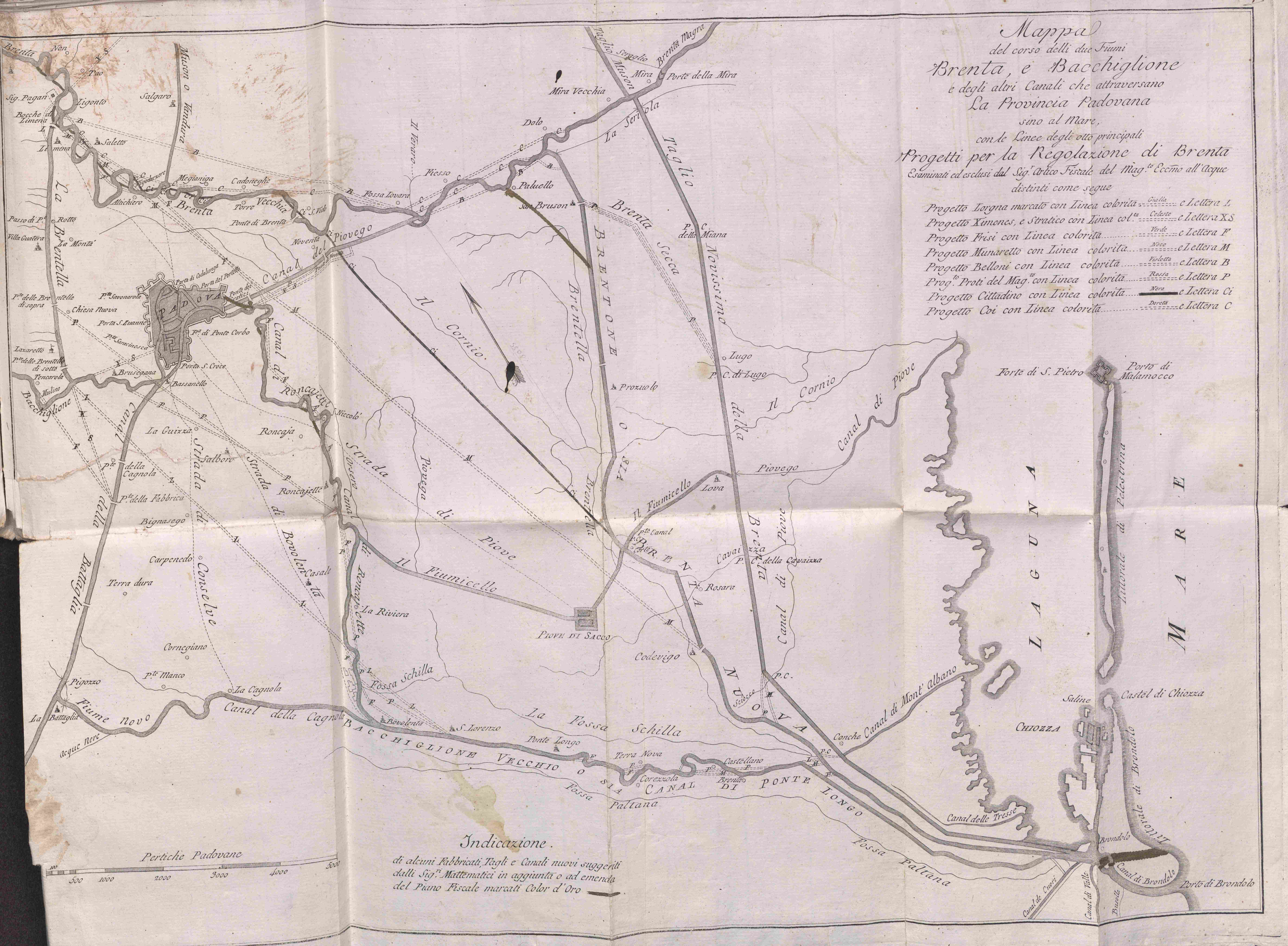 Mappa del corso dei fiumi Brenta e Bacchiglione nel diciottesimo secolo